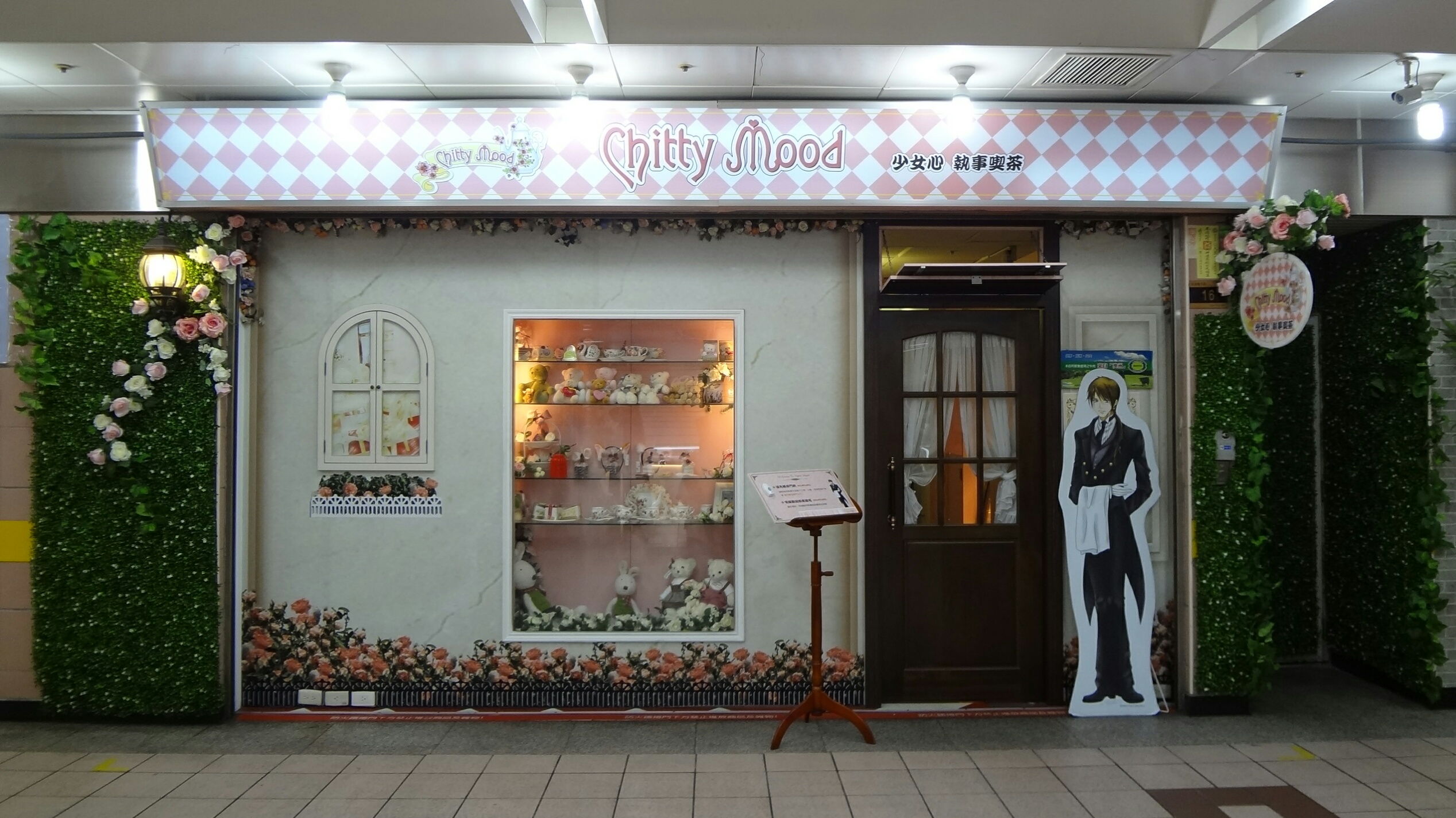 少女心執事喫茶，位於台北地下街16號店。